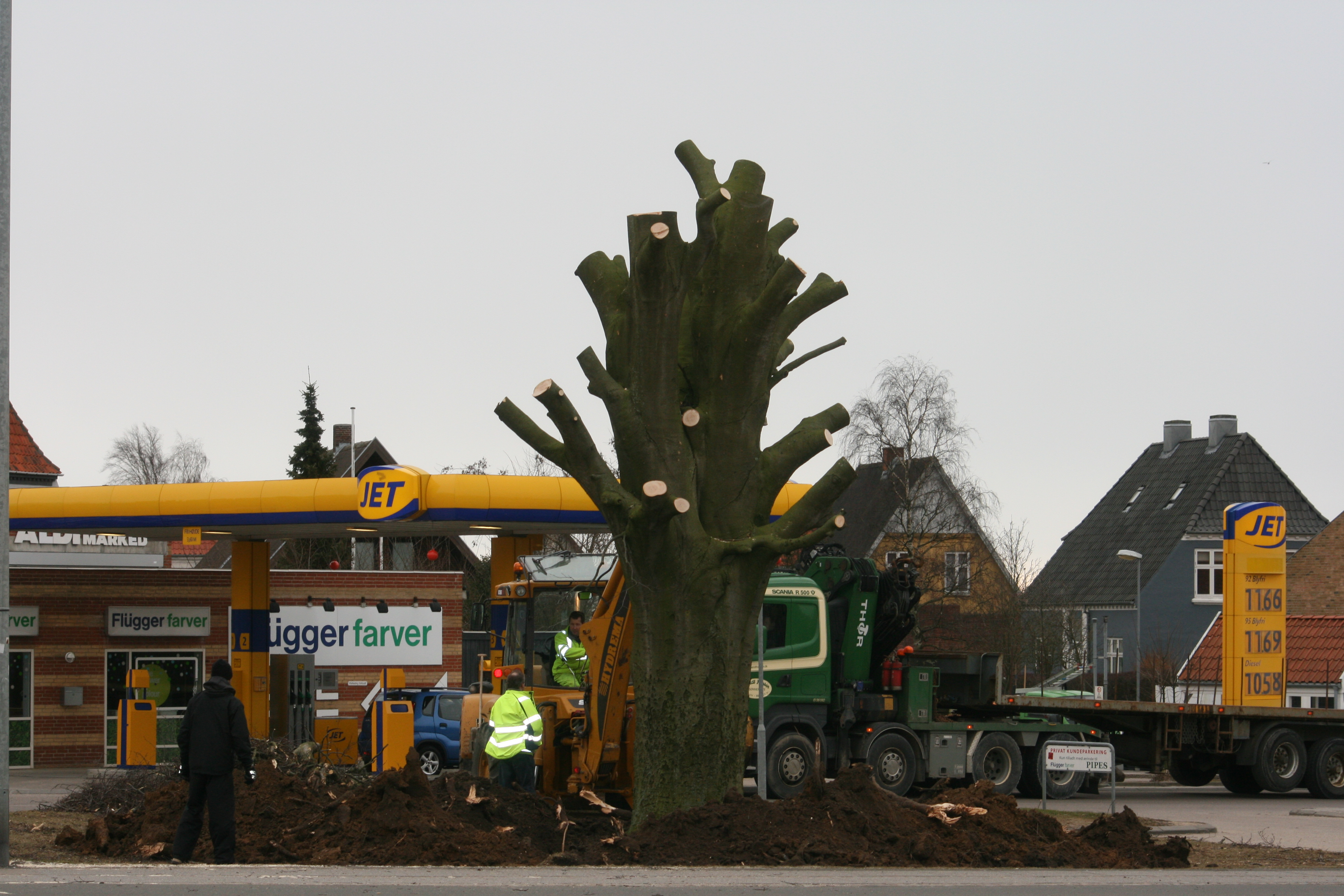 Fældning af Blodbøgen på Randersvej i Århus